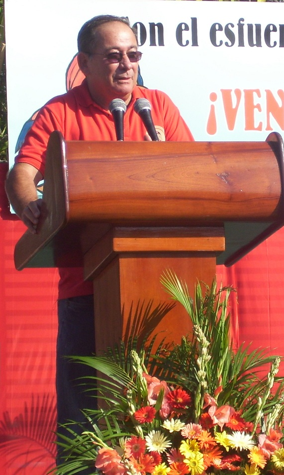 Es una imágen del Secretario del Partido en Santiago de Cuba, que fue tomada mientras discursaba en un acto público en el parque Abel Santamaría de dicha provincia cubana.